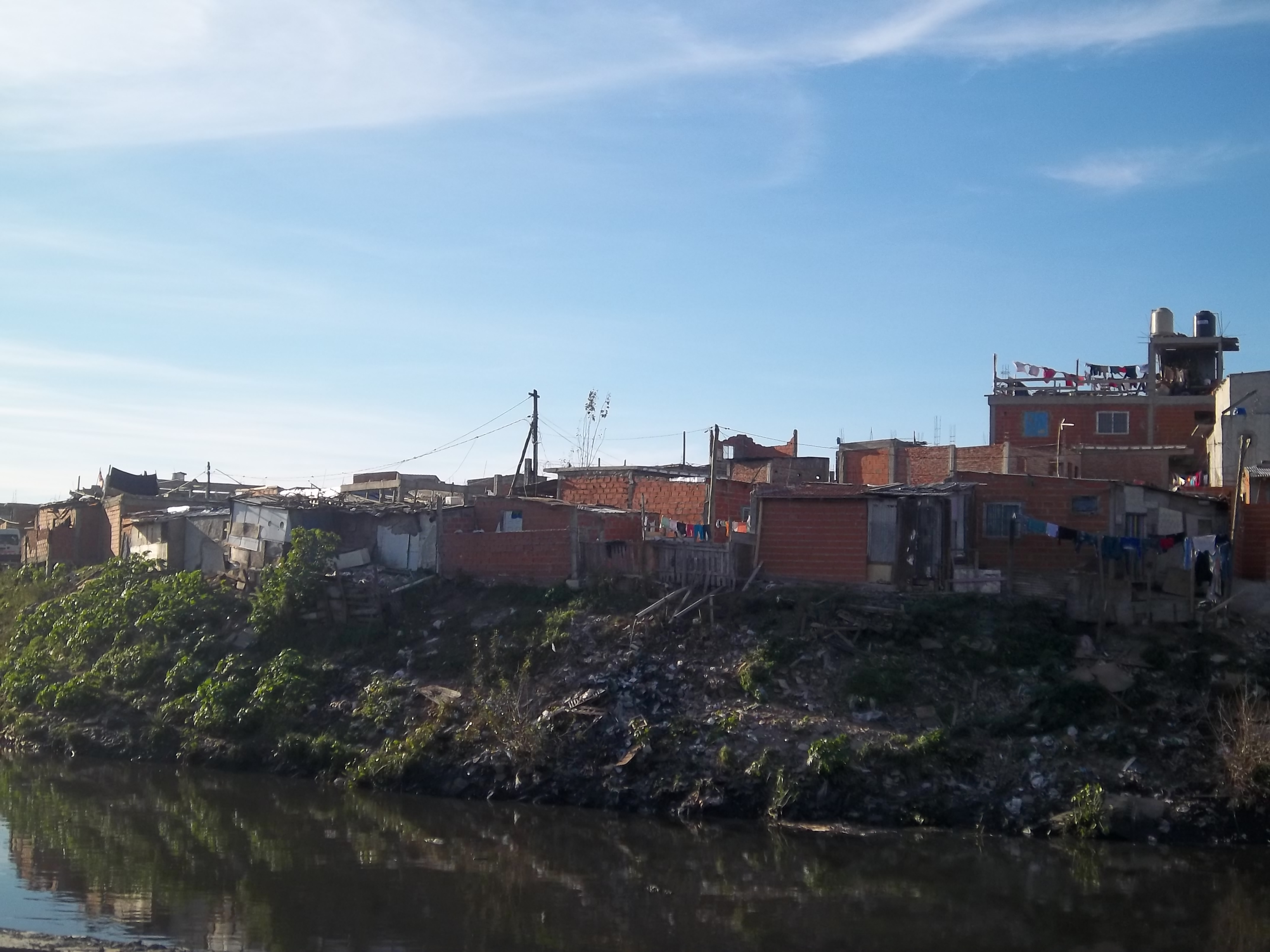 Villa 21-24 en el barrio de Nueva Pompeya, ciudad de Buenos Aires, desde Piñeyro, partido de Avellaneda, provincia de Buenos Aires, Argentina.